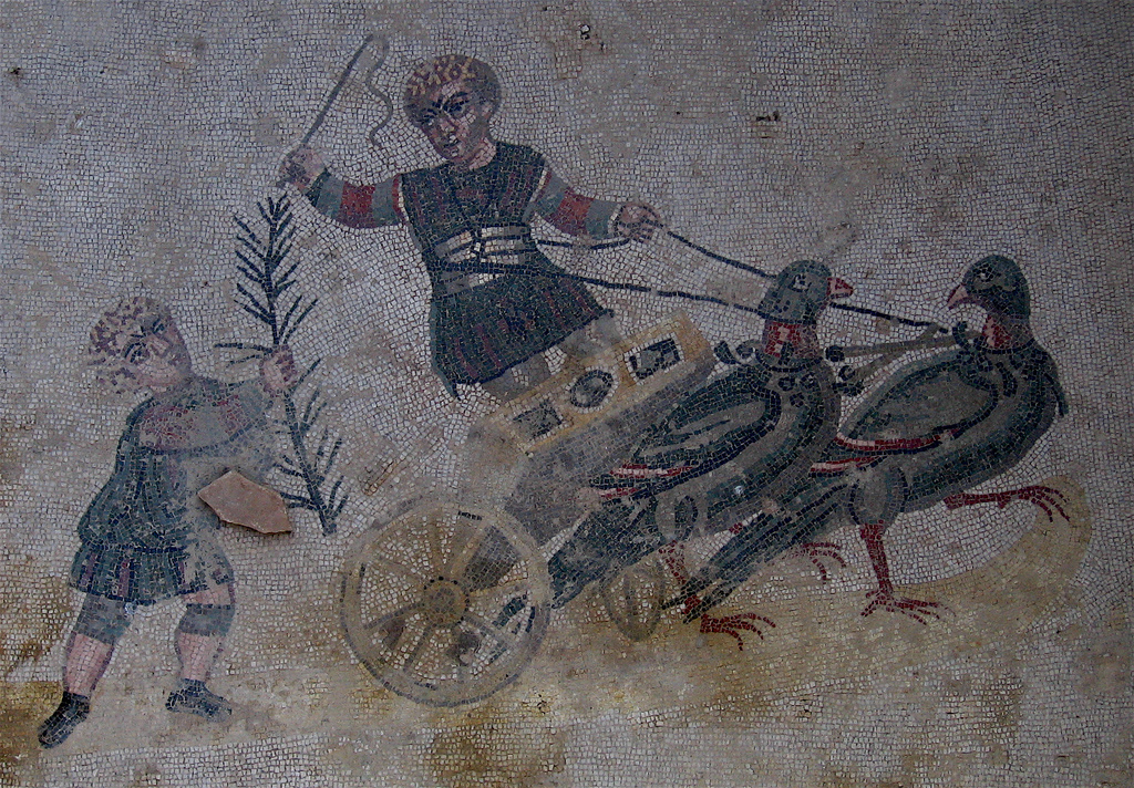 Villa Romana del Casale, Piazza Armerina, Sicily/Sicilia, Italy/Italien